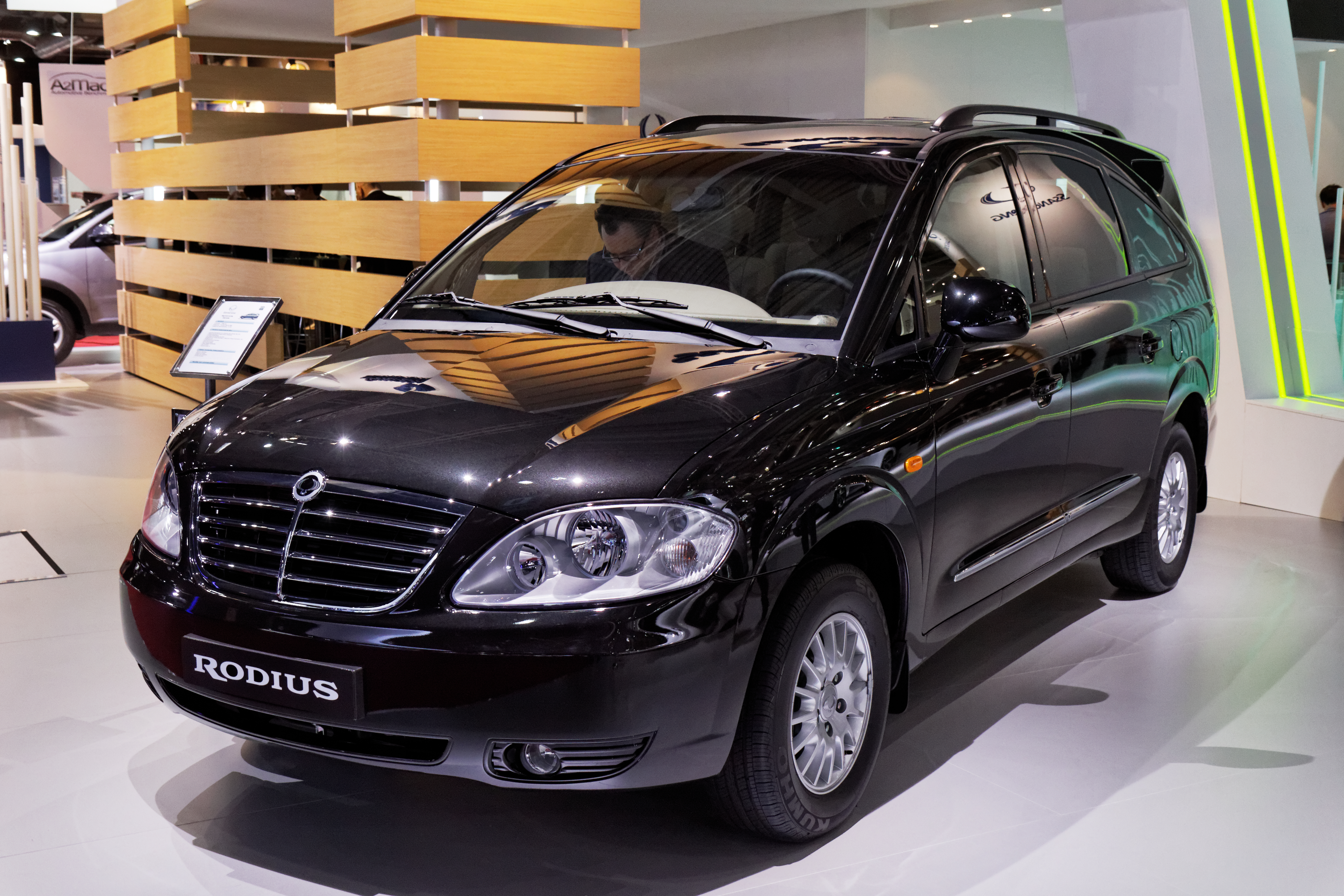 Une SsangYong Rodius présentée lors du Mondial de l'Automobile de Paris 2012.